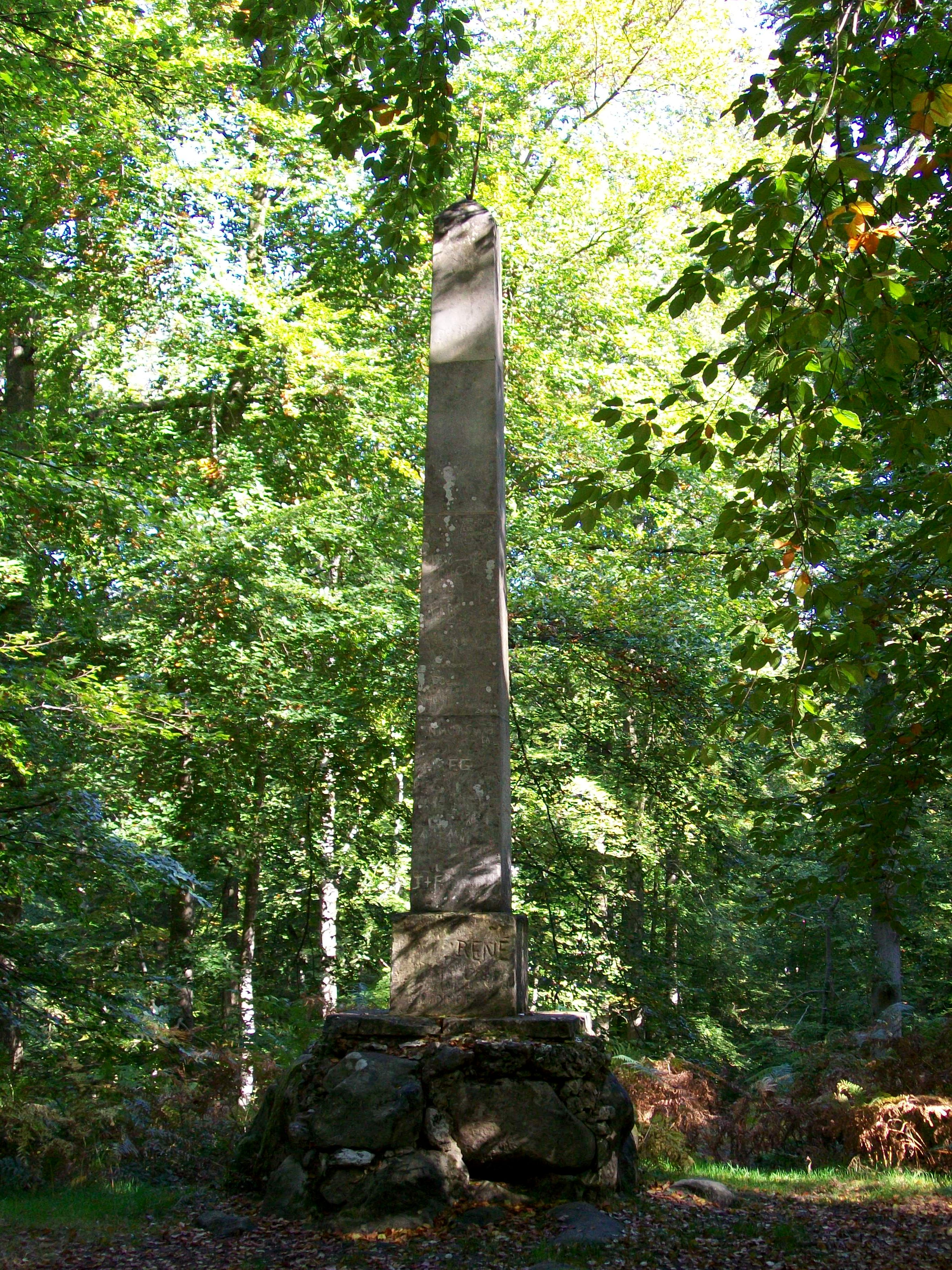 L'obélisque du roi de Rome dans la Forêt domaniale d'Halatte (Oise), parcelle 111, datation 1811.